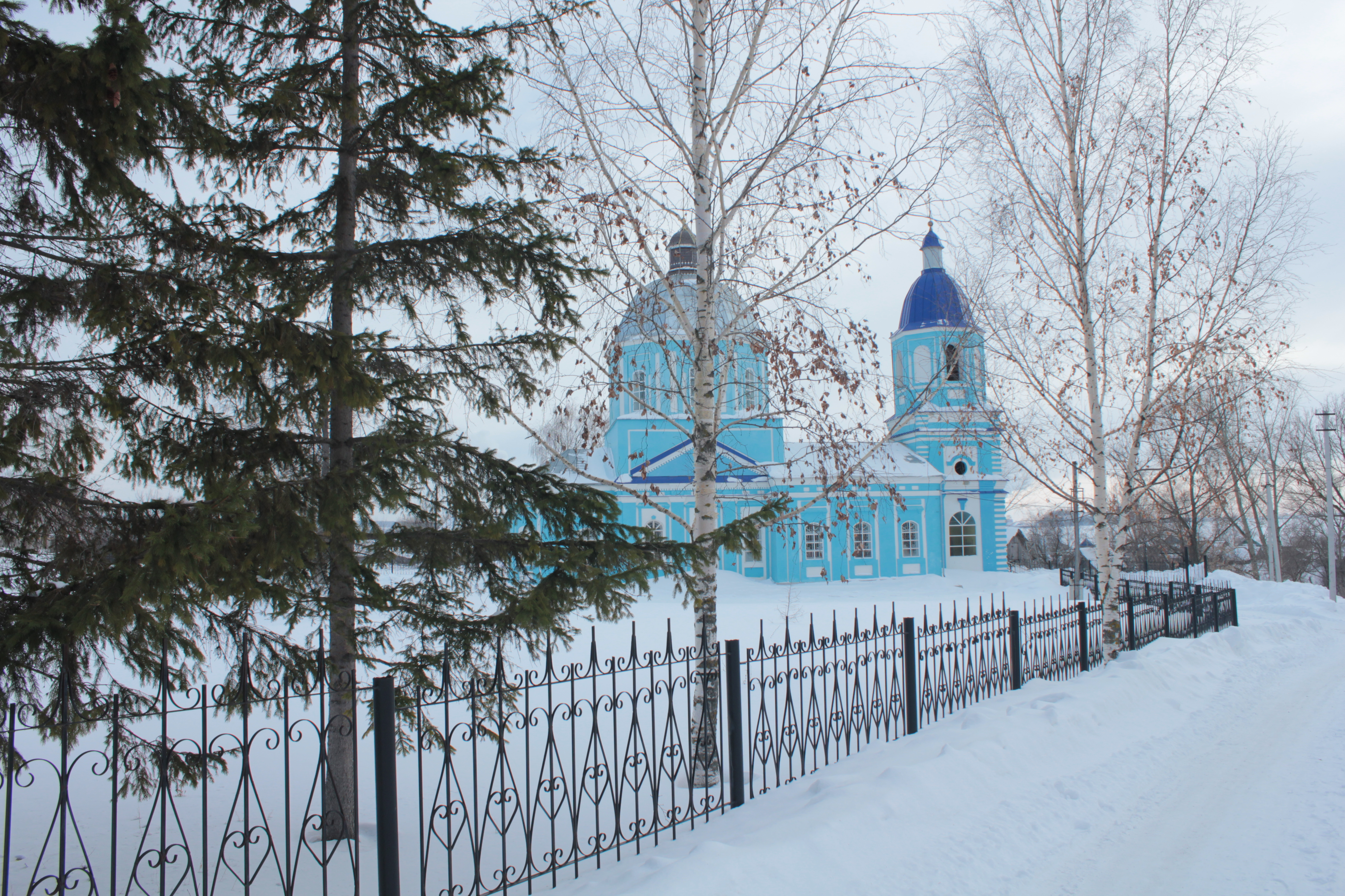 Церковь трёх святителей (Республика Мордовия, Ардатов, село Сабур-Мачкасы)